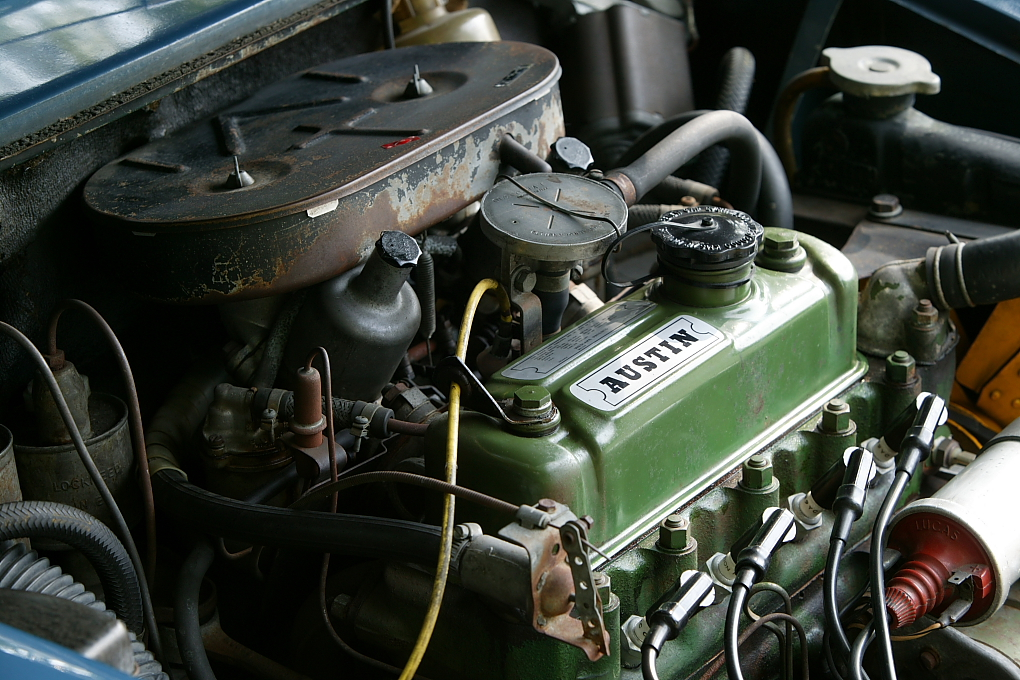 BMC A-Series engine.